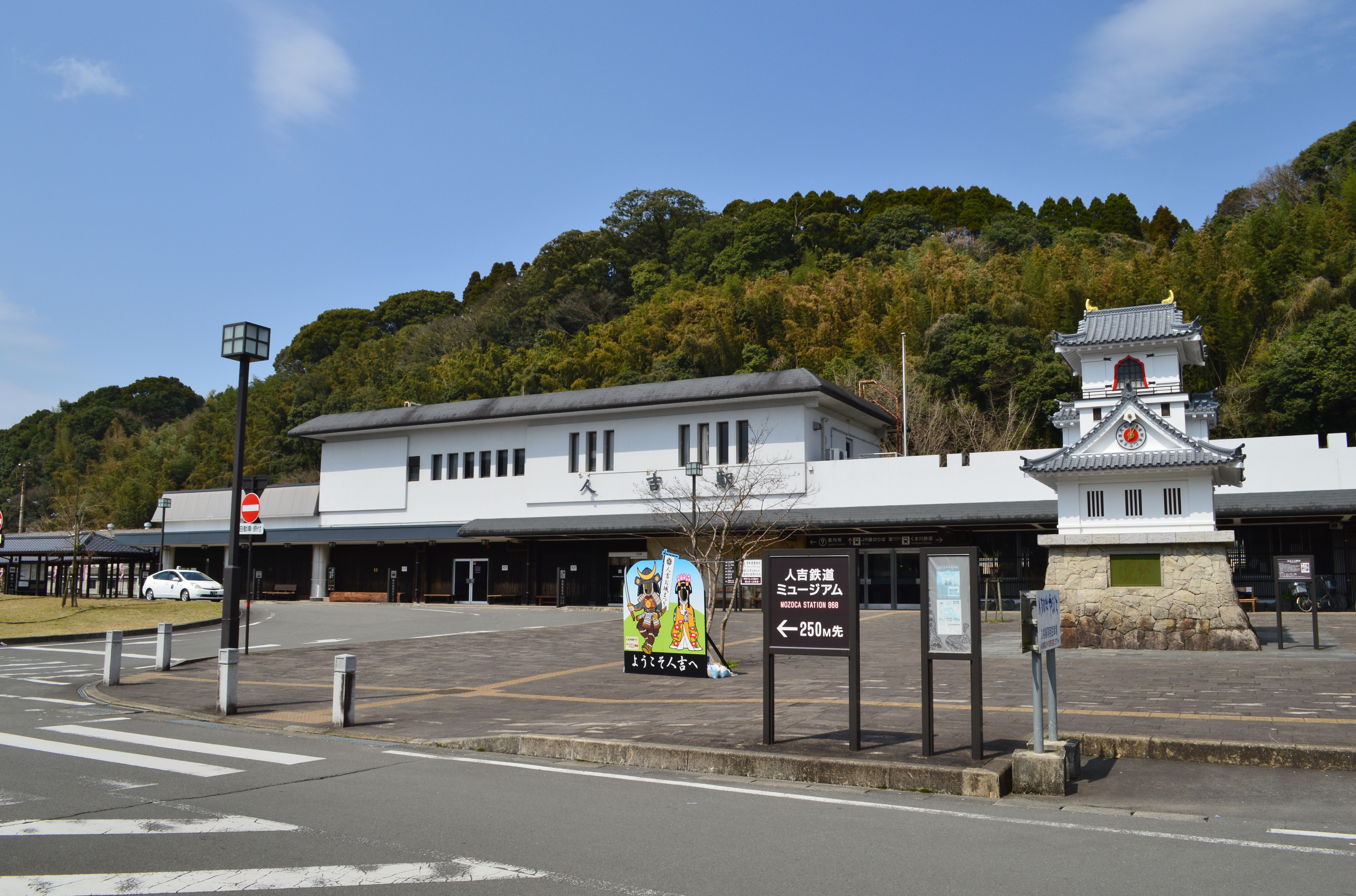 人吉駅 駅舎